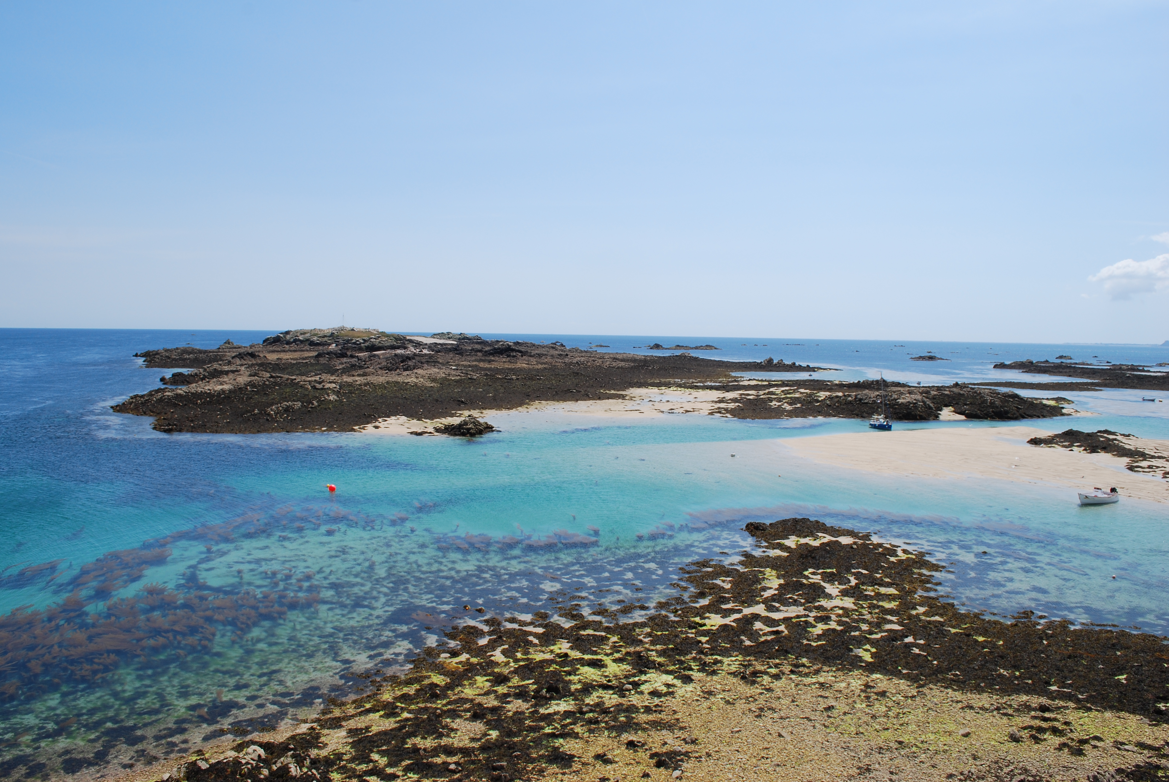 Photo de l'archipel des Écréhou prise en juin 2011. Vue de la Maîtresse Île depuis Marmotière.